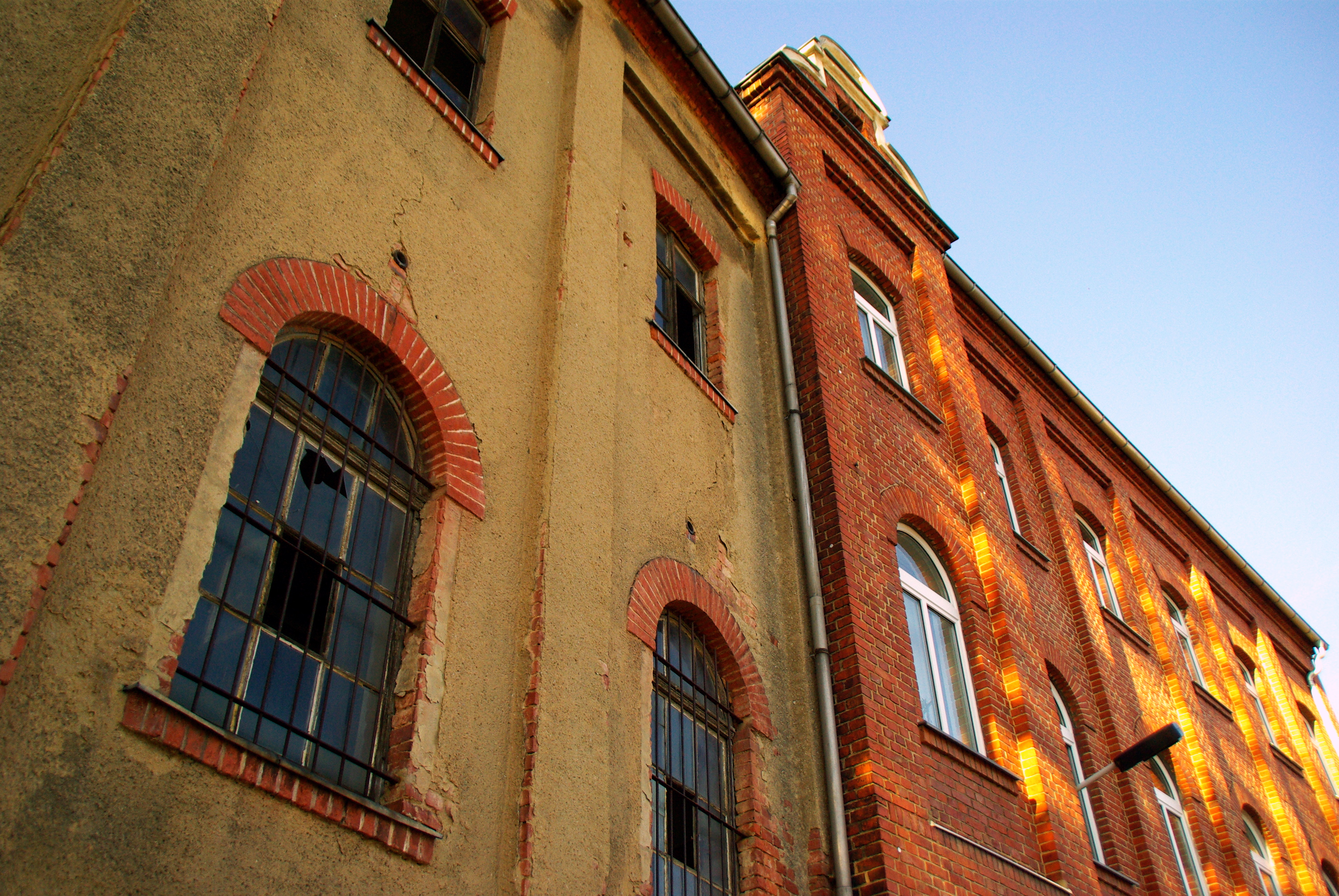 Das Schloß wurde auf den Grundmauern der "Stahlburg" erbaut. Die Stahleburg wurde wahrscheinlich um 1200 erbaut und brannte komplett nieder. Sie wurde 1244 erstmals urkundlich erwähnt. 1564 erwarb Kurfürst August I. die Burg und sie wurde Jagdschloss.Das damals hier untergebrachte Amtsgefängnis mit dazugehöriger Folterkammer befand sich im Turm auf dem "Hohen Eck" , nach dem das Schloss heute benannt ist. 1861/62 wurde hier die königlich-sächsische Weiberzuchtanstalt Hoheneck eingerichtet, die während der DDR Zeit als Gefängnis für politische Häftlinge genutzt wurde und zu zweifelhaften Ruhm kam.